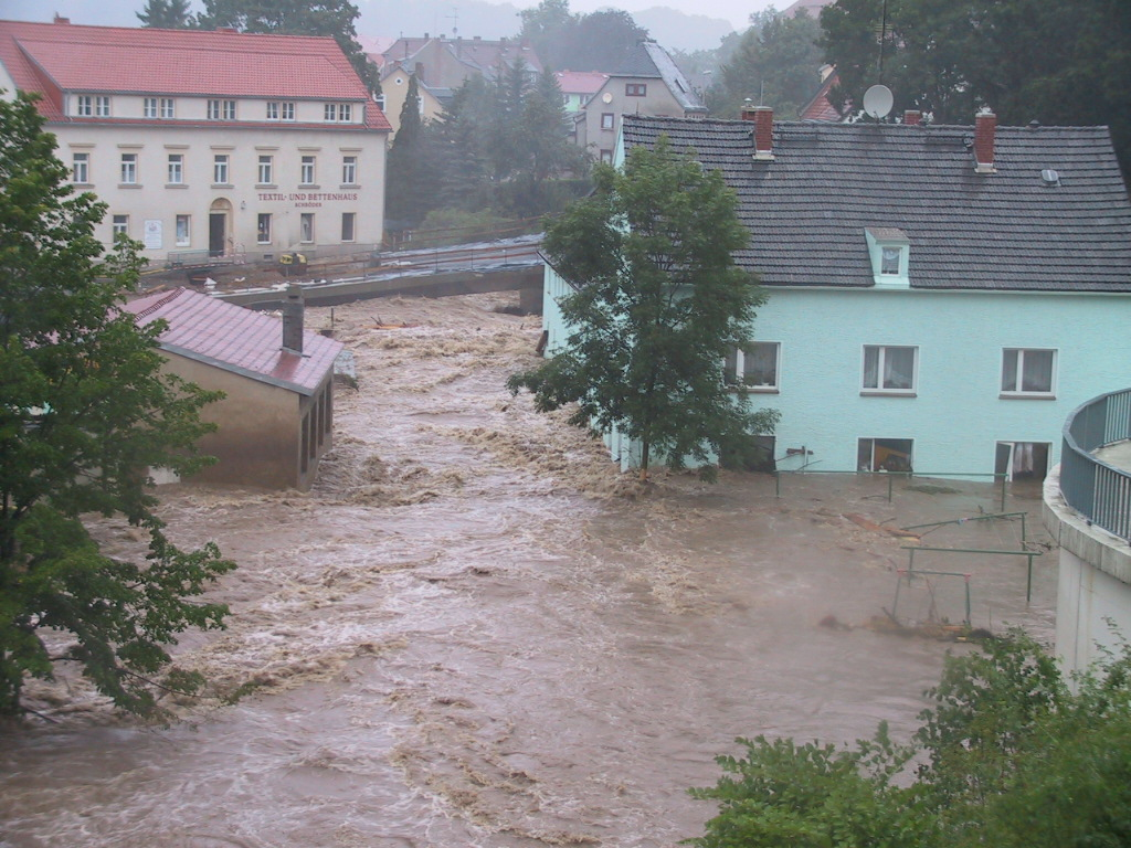 Rote Weißeritz in Dippoldiswalde am 13.08.2002, 08:02 Uhr